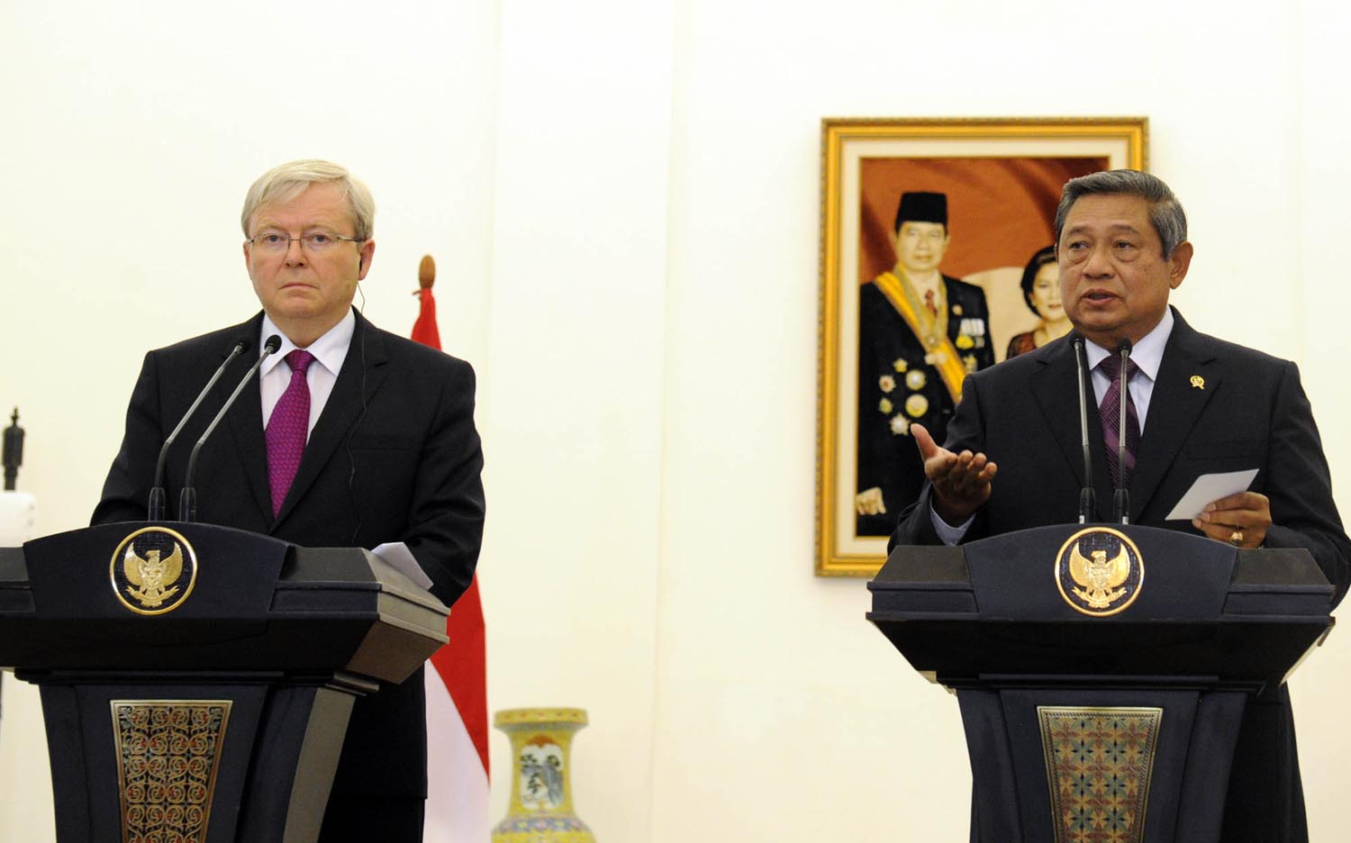 SBY dan Kevin Rudd memberikan keterangan pers bersama seusai Pertemuan Tahunan ketiga Indonesia-Australia di Istana Bogor, 5 Juli 2013.